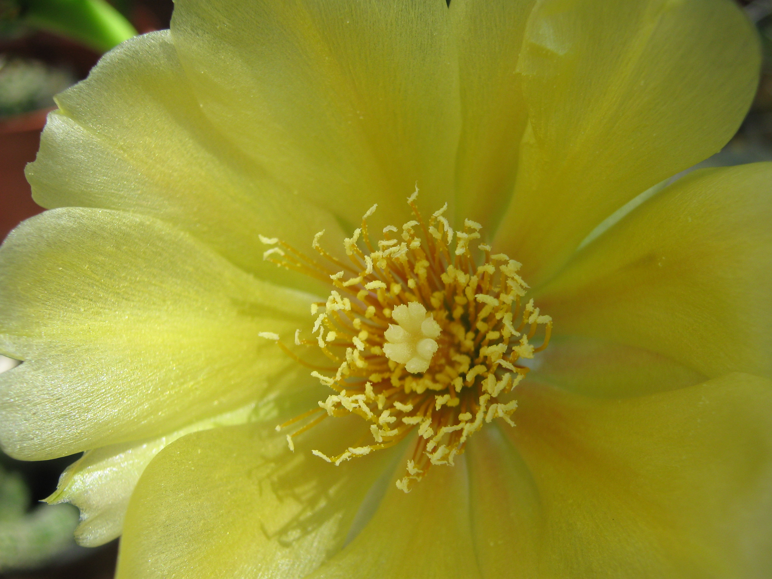 A fügekaktusz virága (Szeged, Baktói kiskertek)